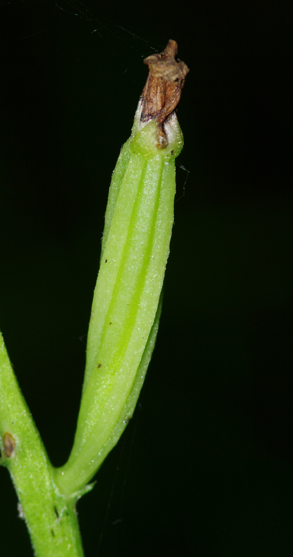 Buławnik mieczolistny (Cephalanthera longifolia) - owoc / Bukowa Góra - Dąbrowa Górnicza